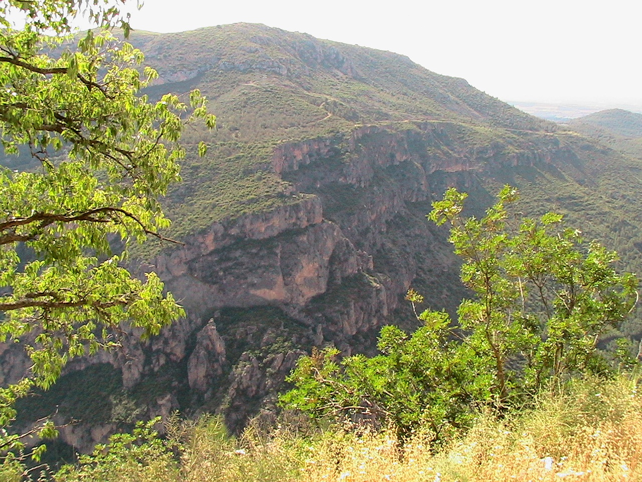 El Tossal de Sant Jordi des de la Cova del Tabac, a l'Estrem del Mont-roig. Camarasa (Noguera - Catalunya)